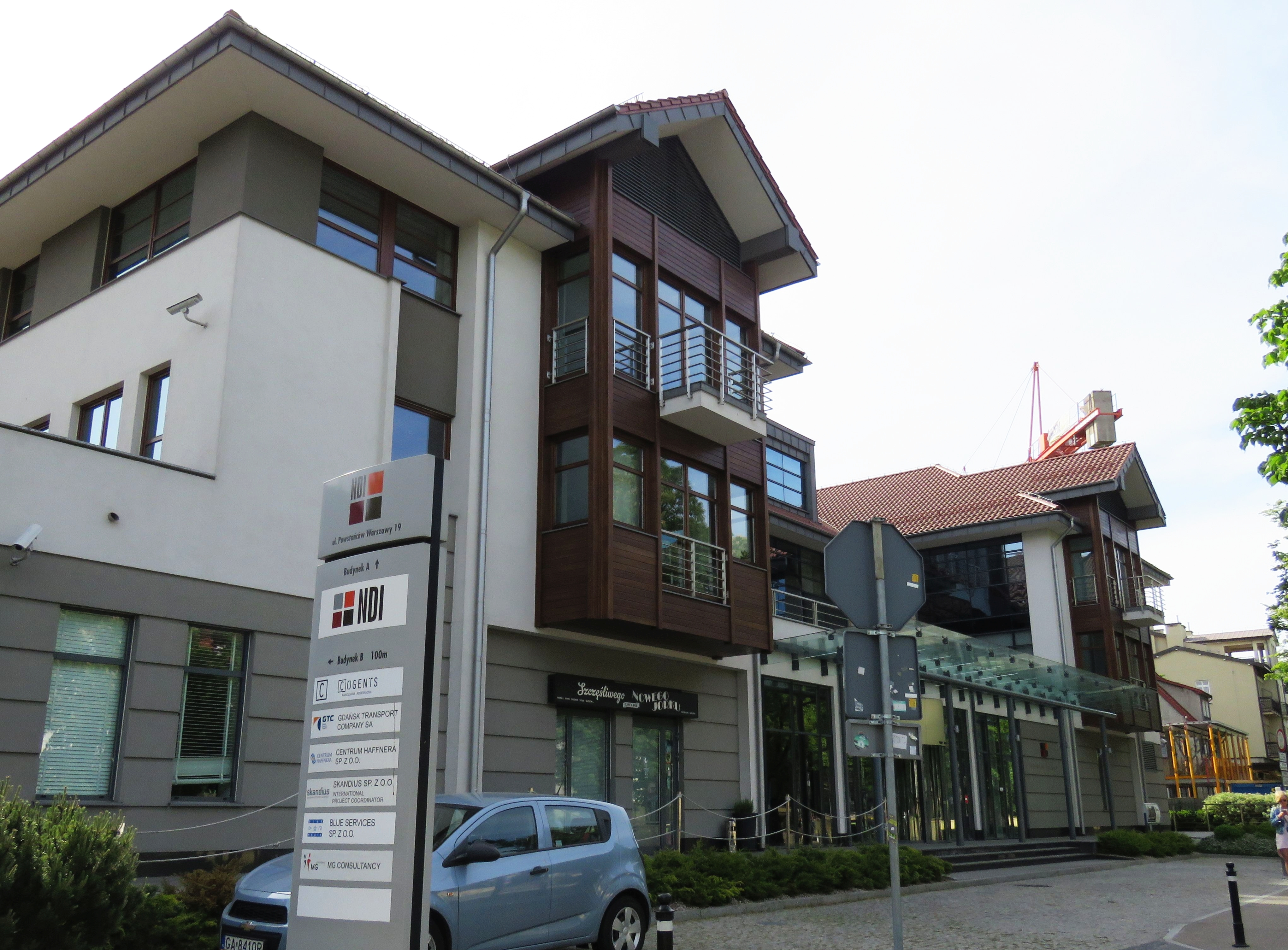 Sopot Dolny, ul. Powstańców Warszawy 19 - siedziba spółki GTC